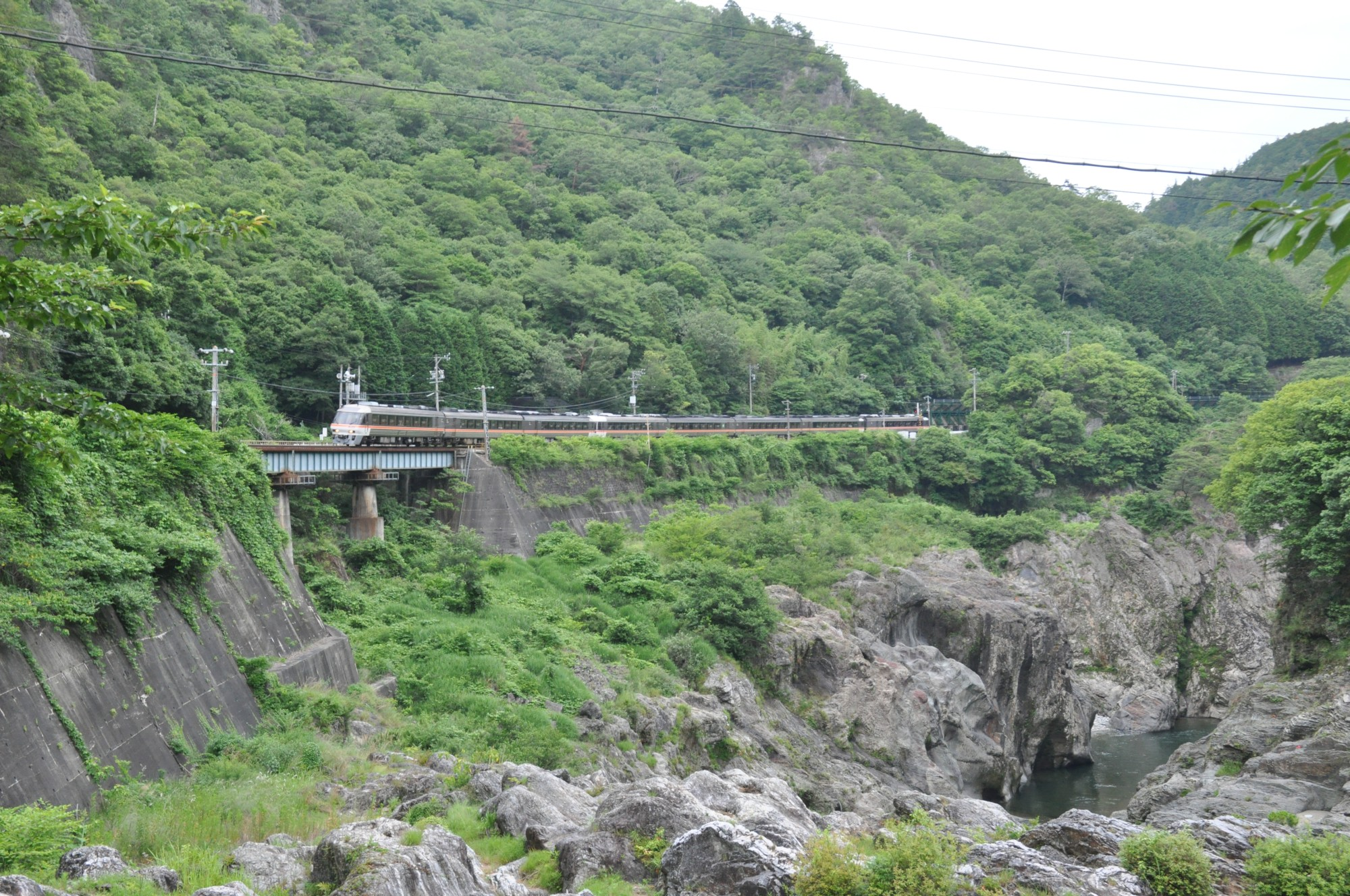 飛水峡から見た特急ひだ号